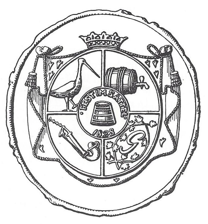 Siegel des Gambrinus